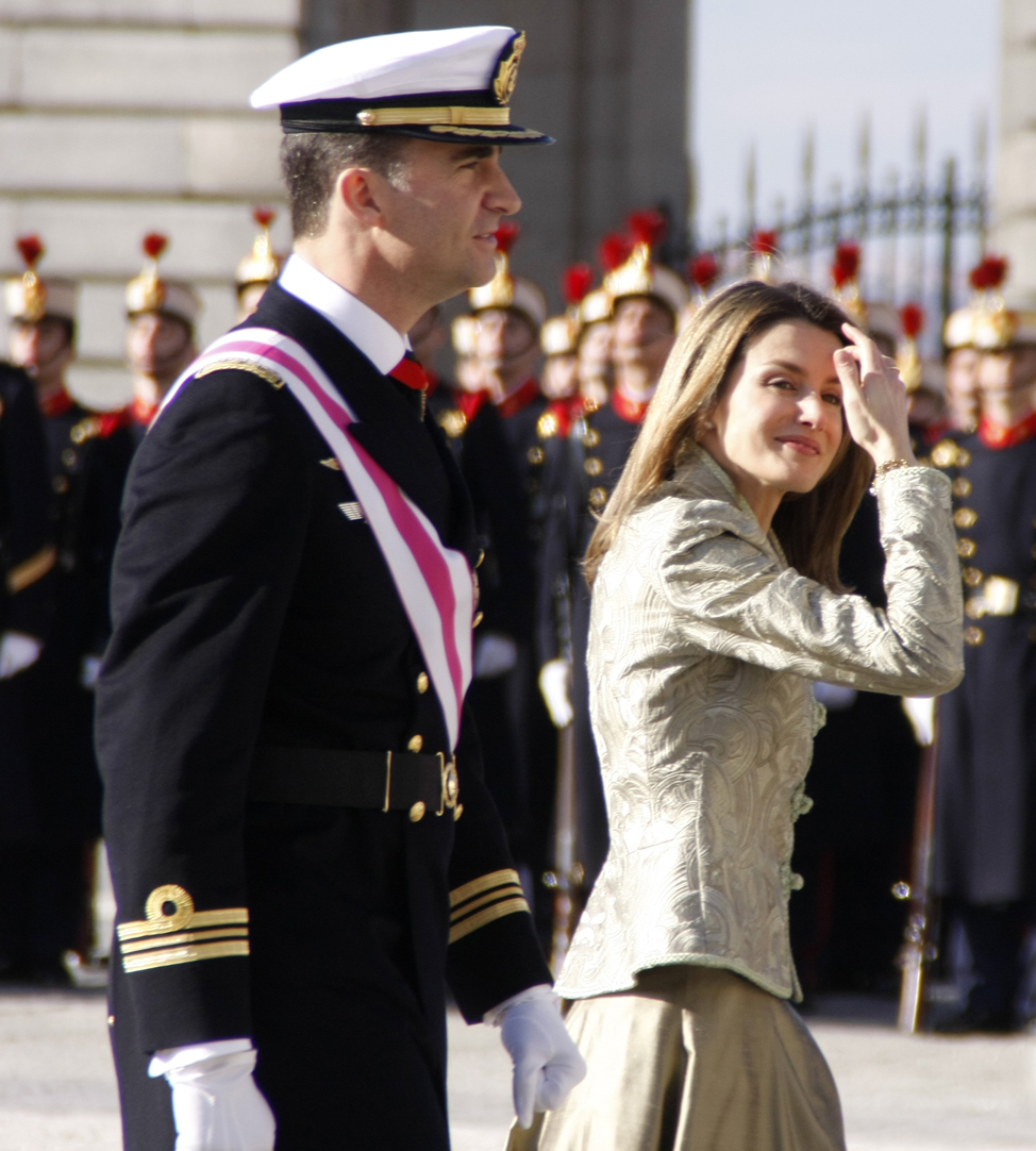 Los Príncipes de Asturias en la Pascua Militar de 2009, en la Plaza de la Armería del Palacio Real de Madrid.